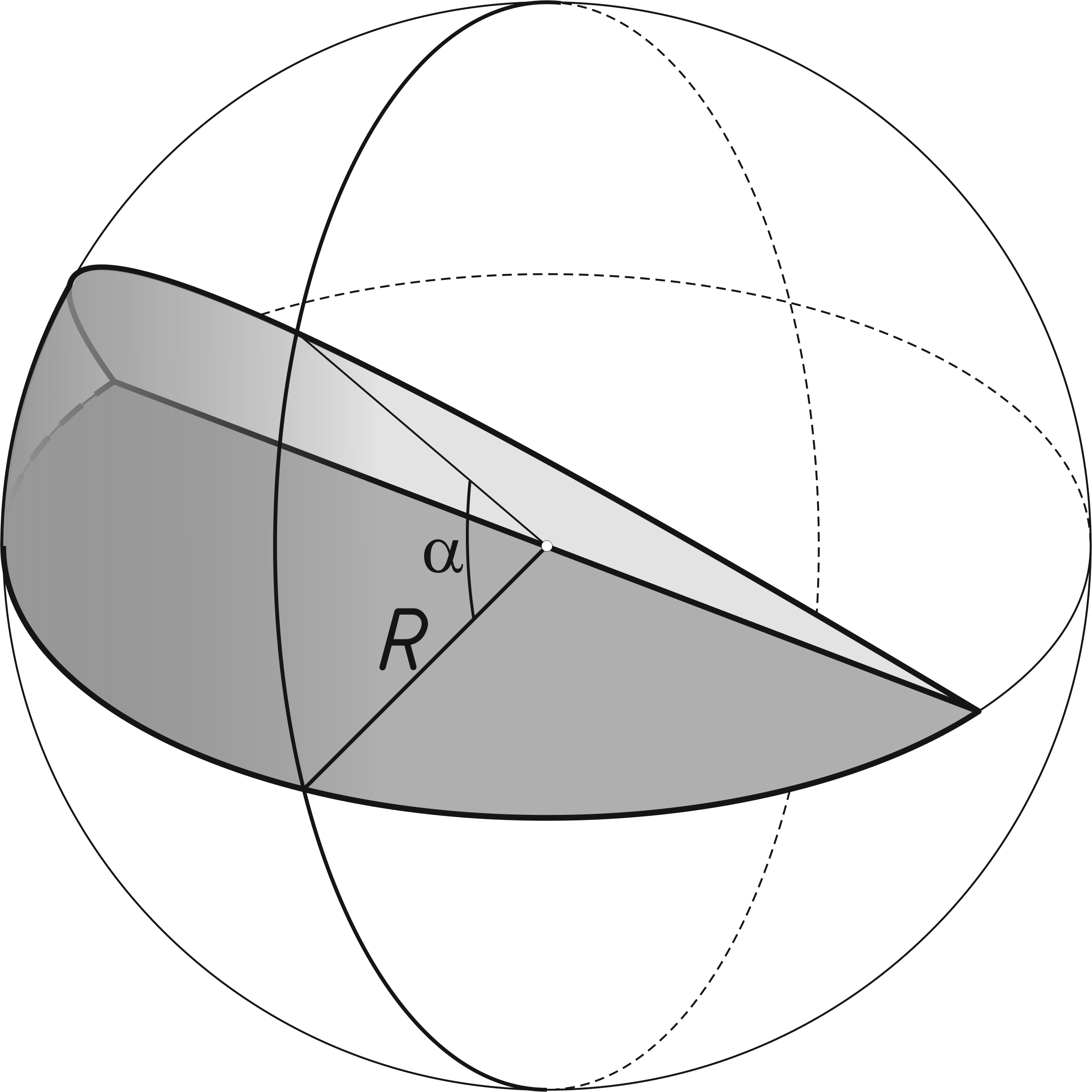 Bild eines Kugelkeils